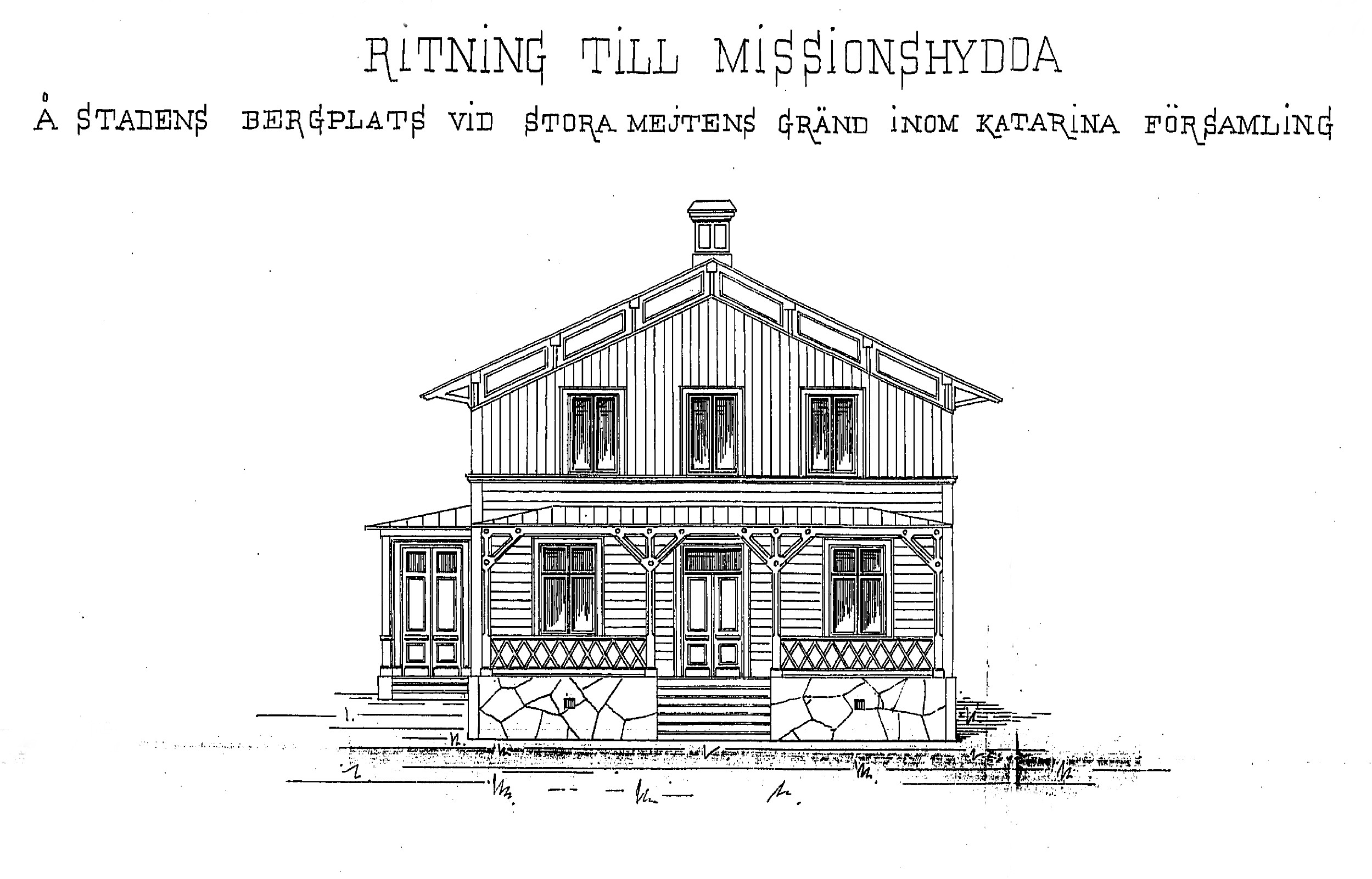 Fasadritning till Missionshyddan, Stora Mejtens gränd 8